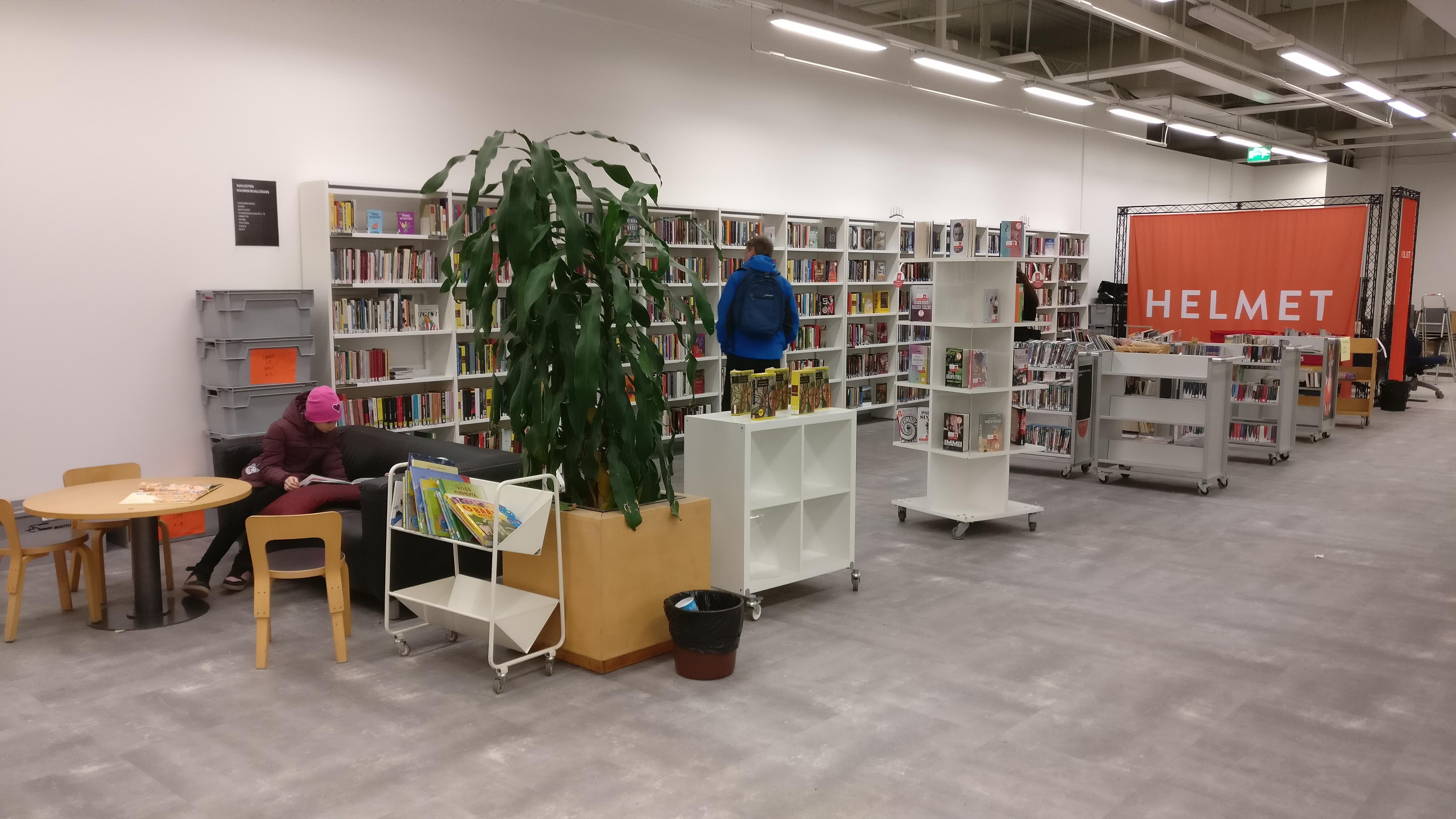 Kuva Koivukylän uuden kirjaston sisältä.